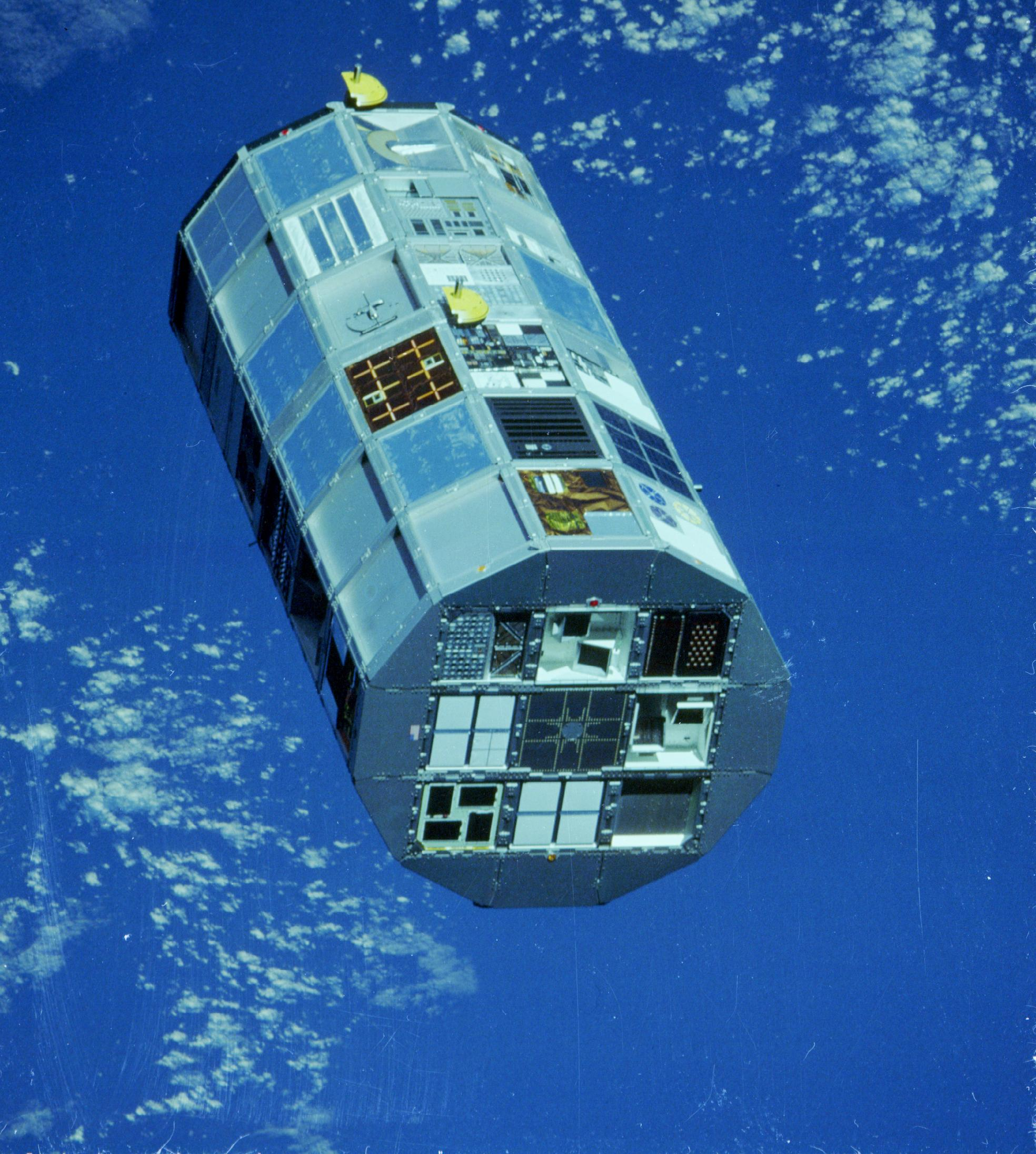 LDEF: After Deployment